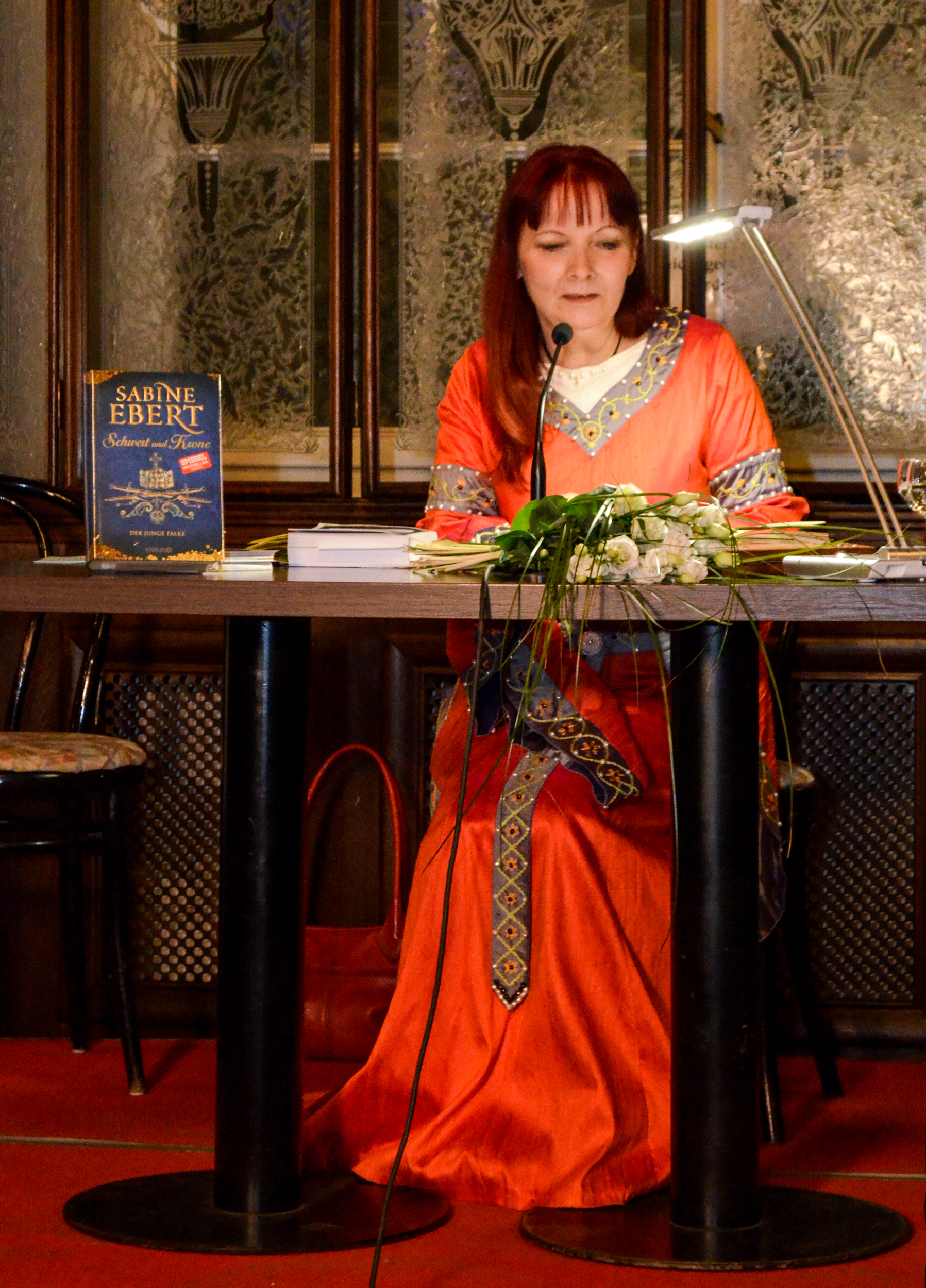 Foto von der Buchpremiere von Schwert und Krone – Der junge Falke in der Buchhandlung Ludwig in Leipzig, aufgenommen am 2. November 2017.